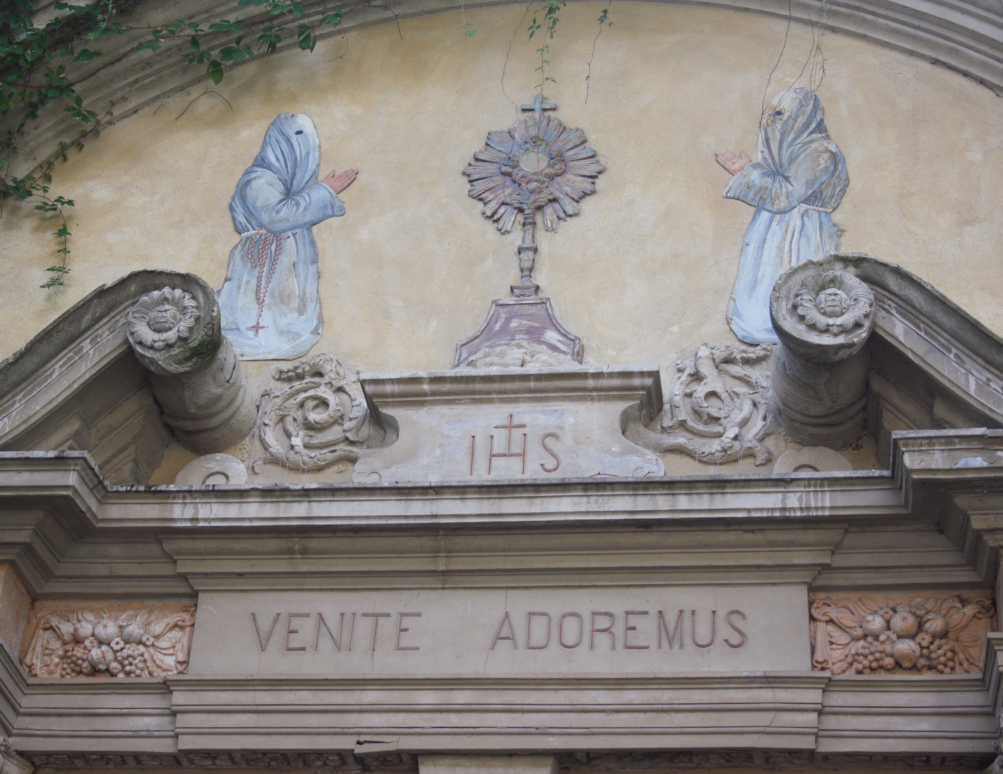 Chapelle des pénitents gris in Avignon